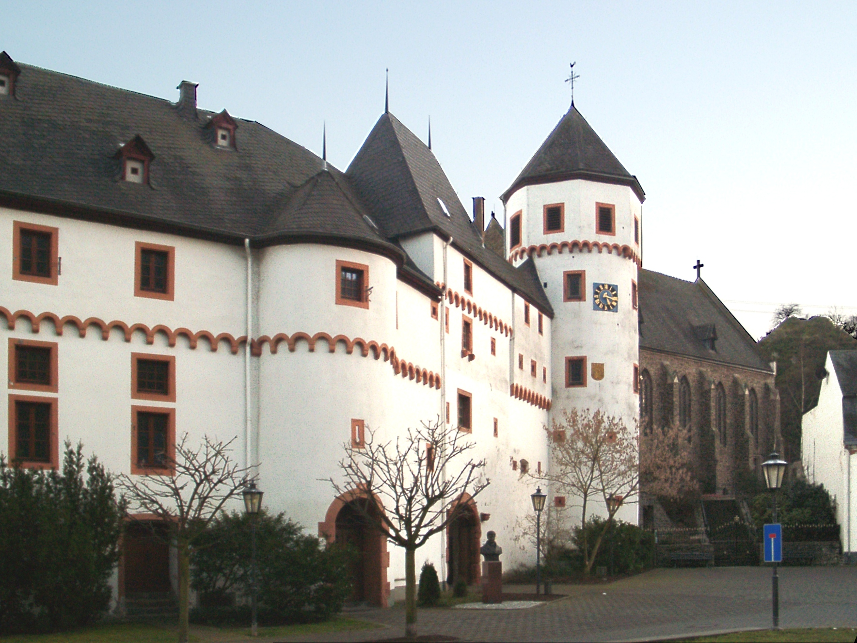 Schloss in Gondorf (Mosel) mit Kirche - selbst fotografiert 5.2.2005 - Lizenz: CC-BY